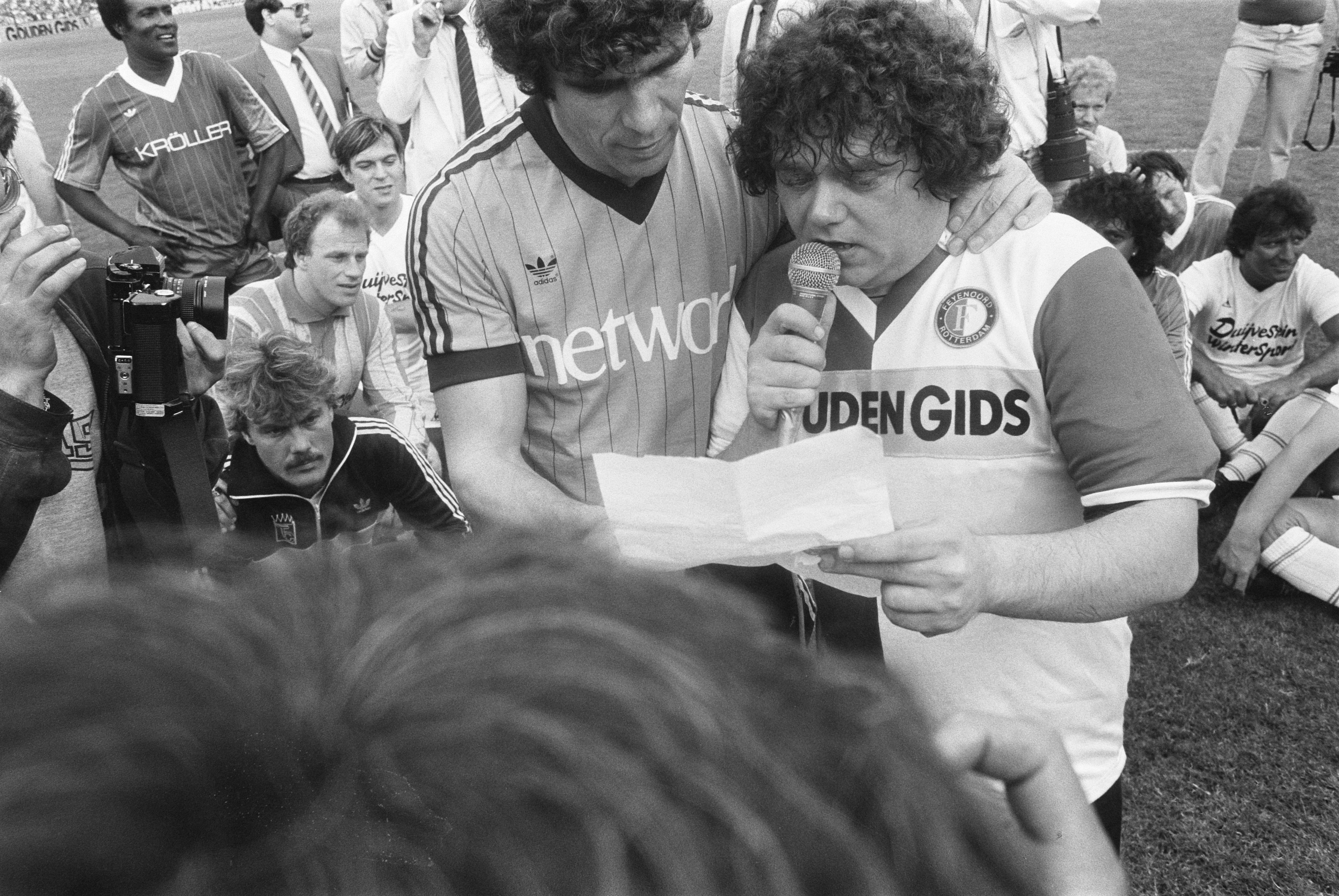 Collectie / Archief : Fotocollectie Anefo Reportage / Serie : Afscheidswedstrijd van Willem van Hanegem met het WK'74 team tegen Feyenoord in de Kuip in Rotterdam Beschrijving : Van Hanegem (l) en zanger André Hazes Datum : 4 juni 1983 Locatie : Rotterdam, Zuid-Holland Trefwoorden : huldigingen, voetbal, wedstrijden, zangers Persoonsnaam : Hanegem, Willem van, Hazes, André Instellingsnaam : Feyenoord Fotograaf : Bogaerts, Rob / Anefo Auteursrechthebbende : Nationaal Archief Materiaalsoort : Negatief (zwart/wit) Nummer archiefinventaris : bekijk toegang 2.24.01.05 Bestanddeelnummer : 932-6126